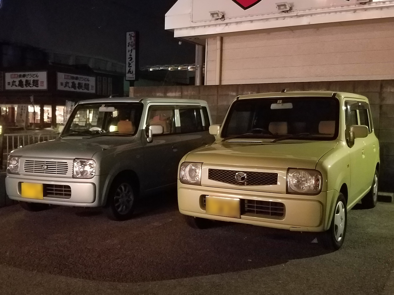 アルトラパン、スピアーノ